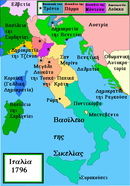 Η Ιταλία το 1796